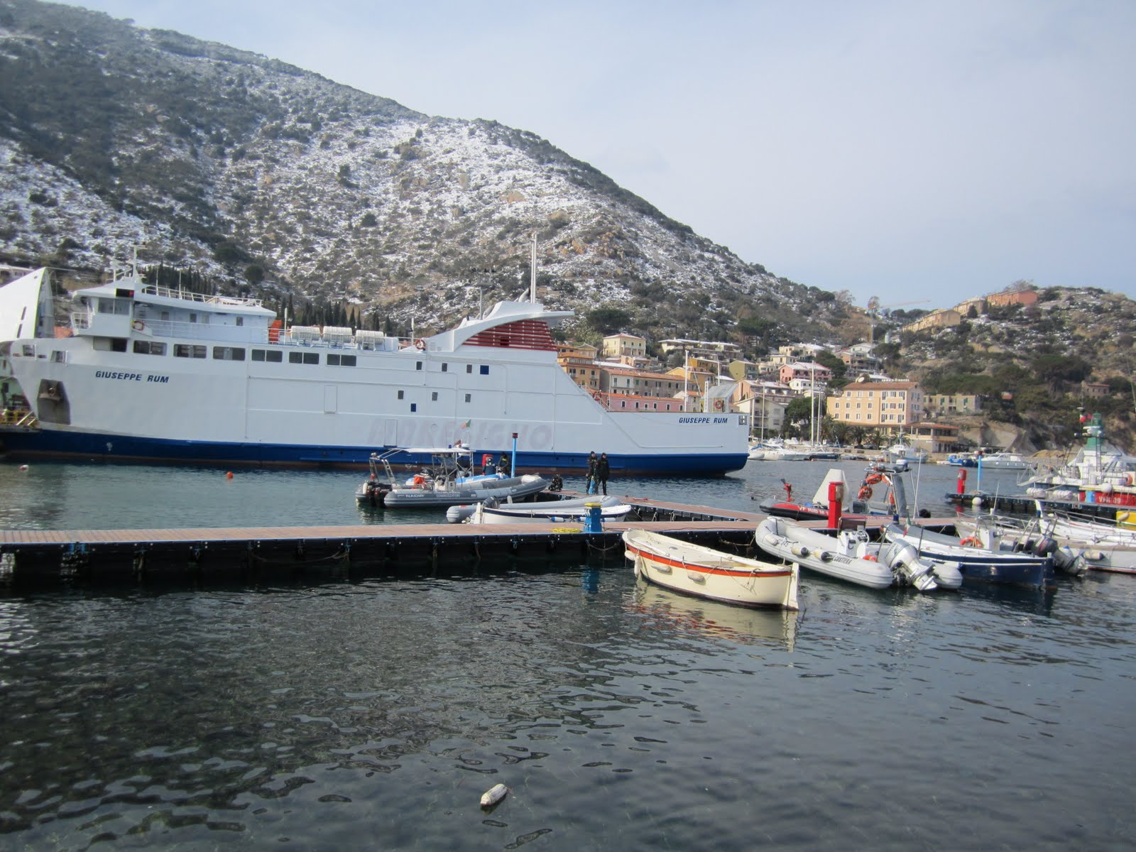 Ya estamos prontos a salir de regreso, espectacular el viaje y todo lo que visitamos!